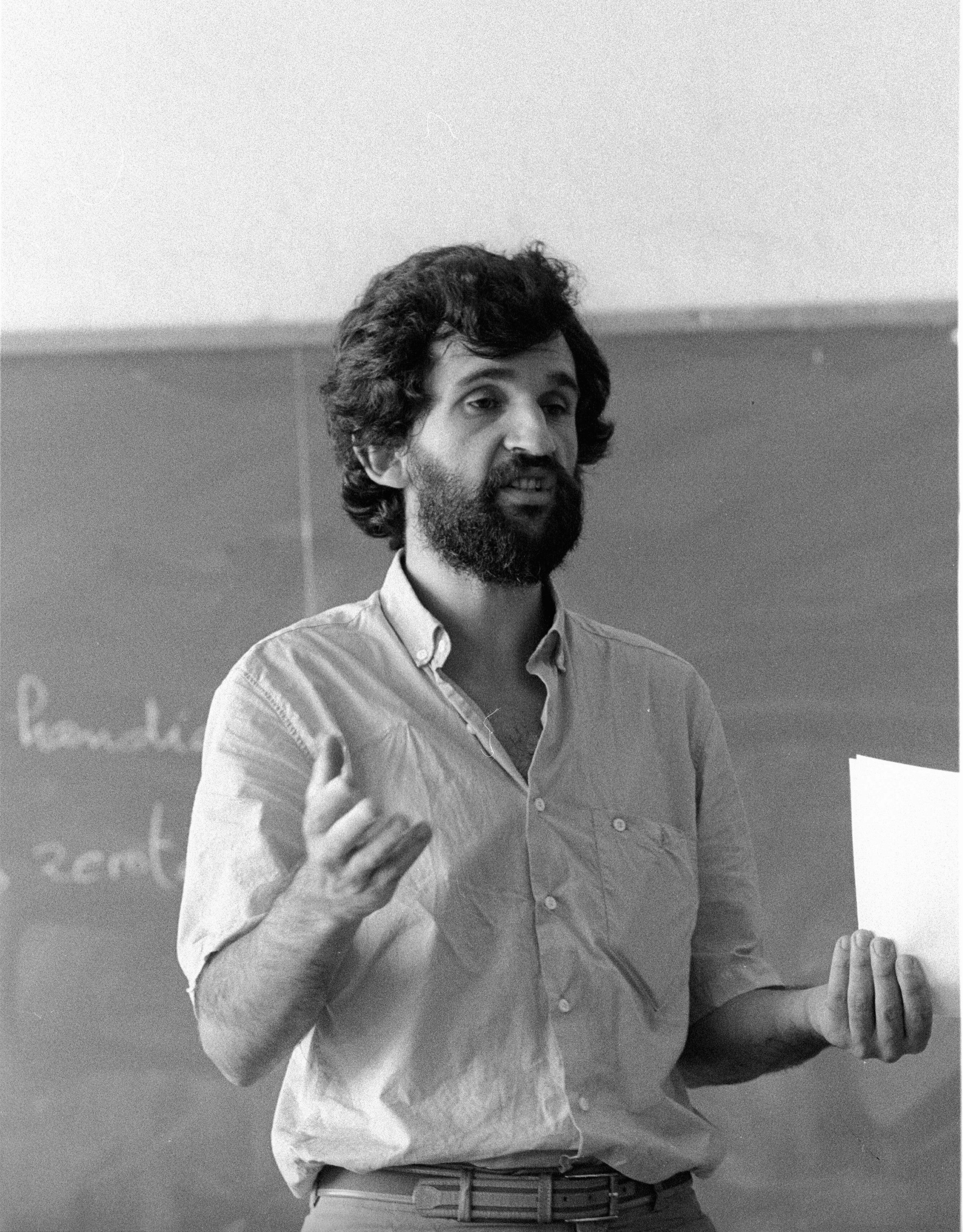 Joseba Agirreazkuenaga ikerlari eta historialaria, 1984an Iruñean UEUn hitzaldi bat ematen.